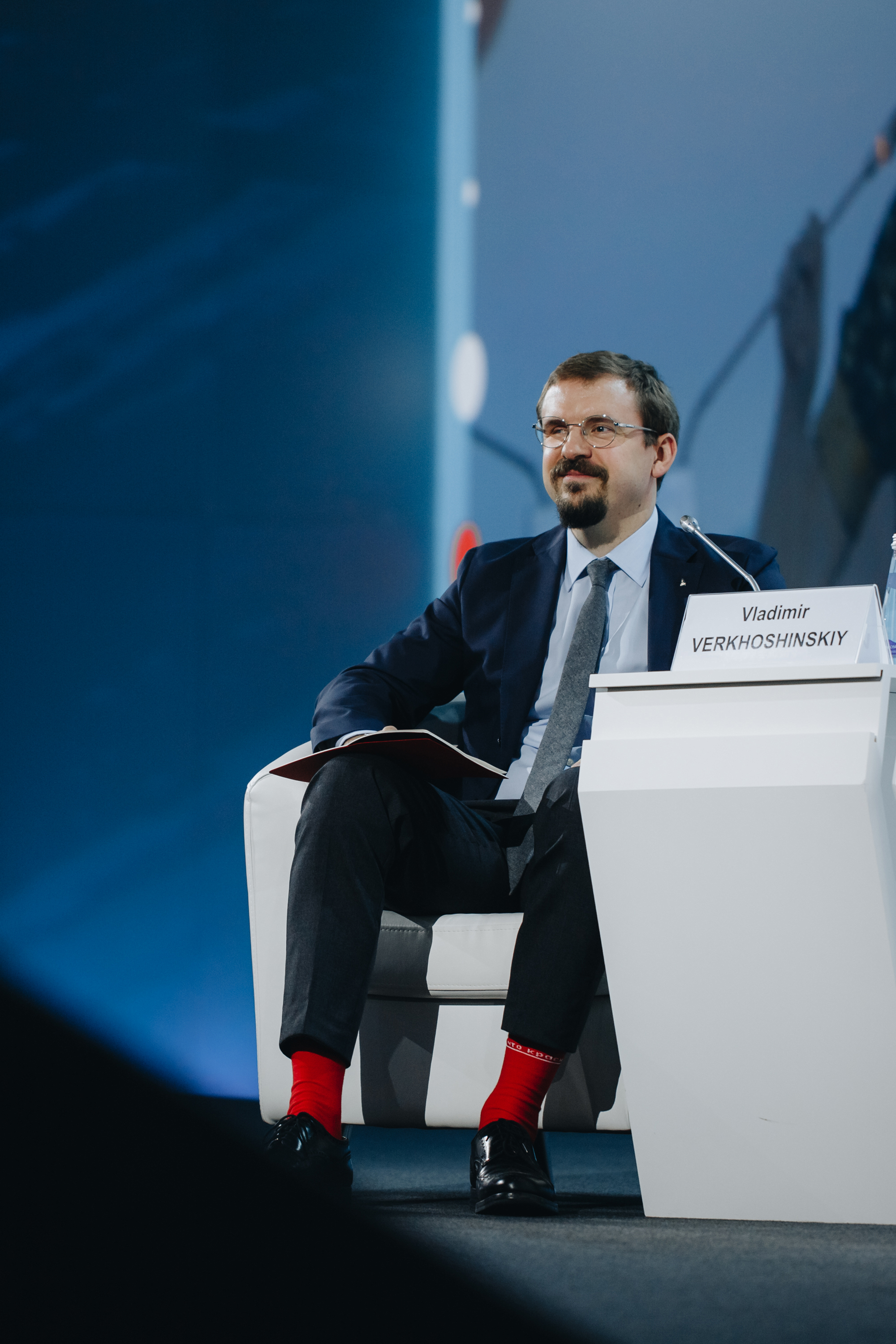 Фото прислано пресс-службой Альфа-банка